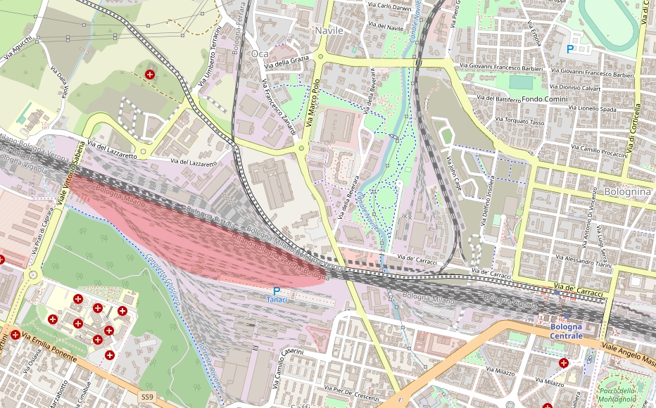 Ubicazione dell'ex scalo Merci di Bologna Ravone